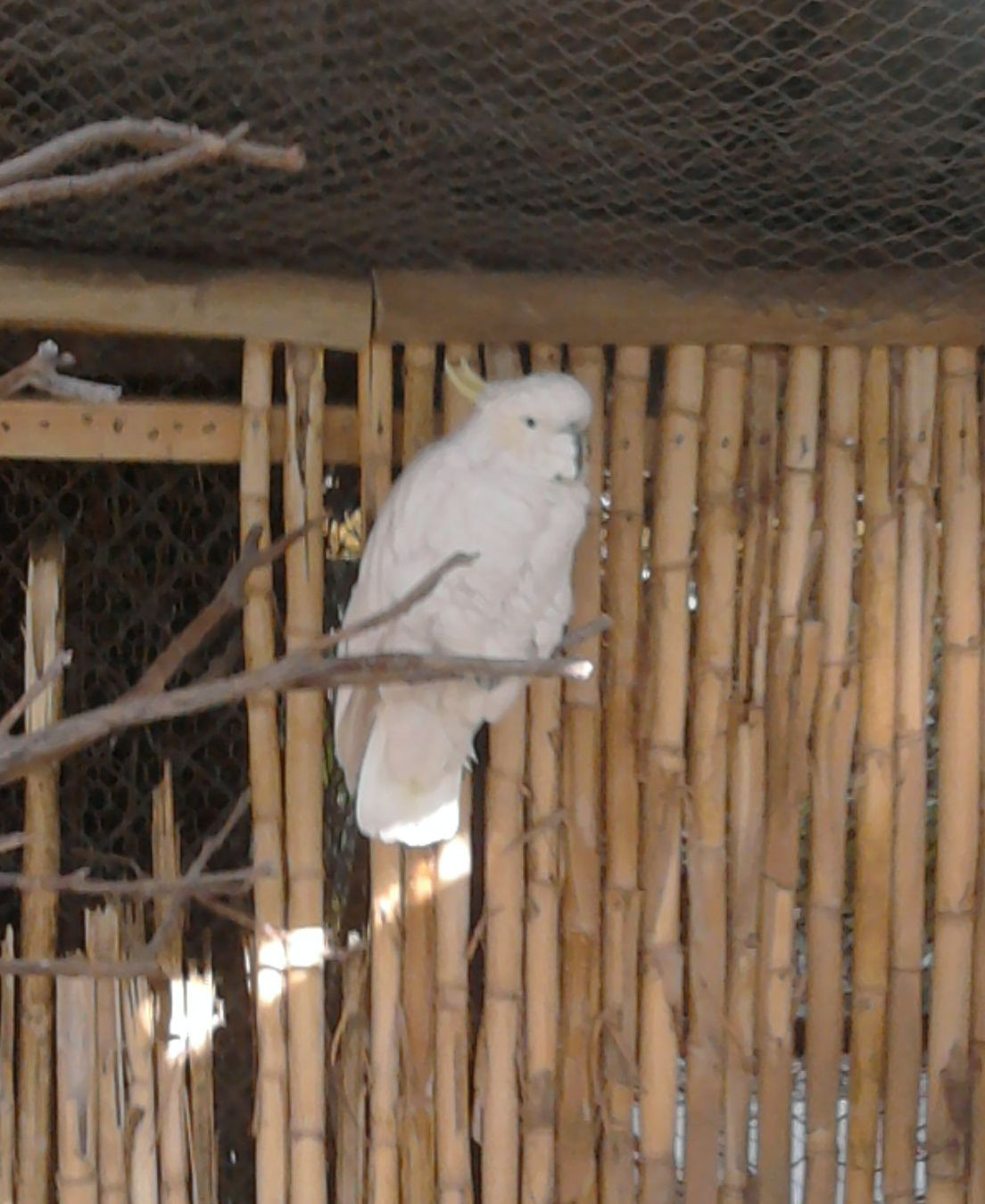 Polo, la cactúa de moño amarillo de Buin Zoo